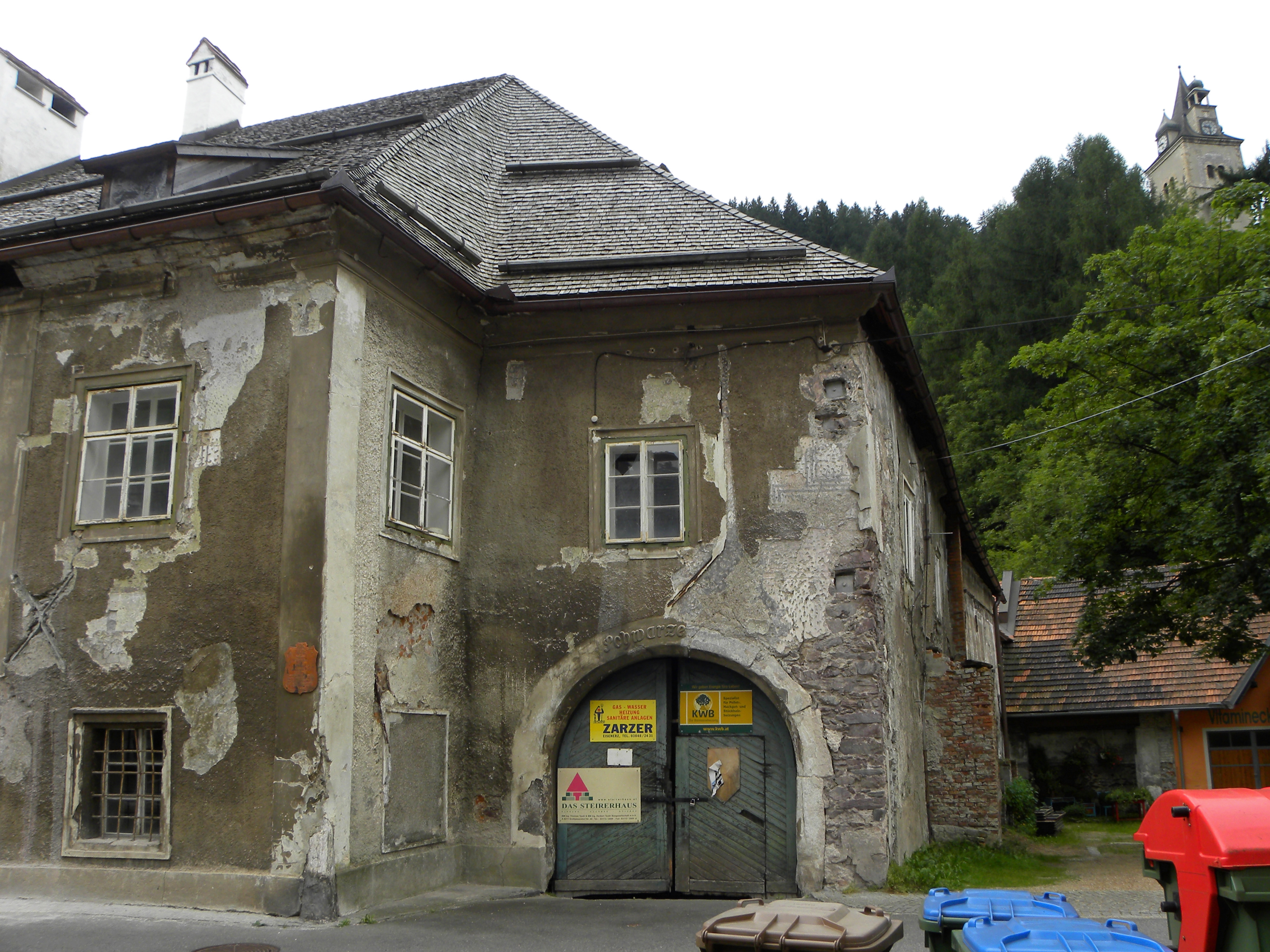 Schwarzer Hof